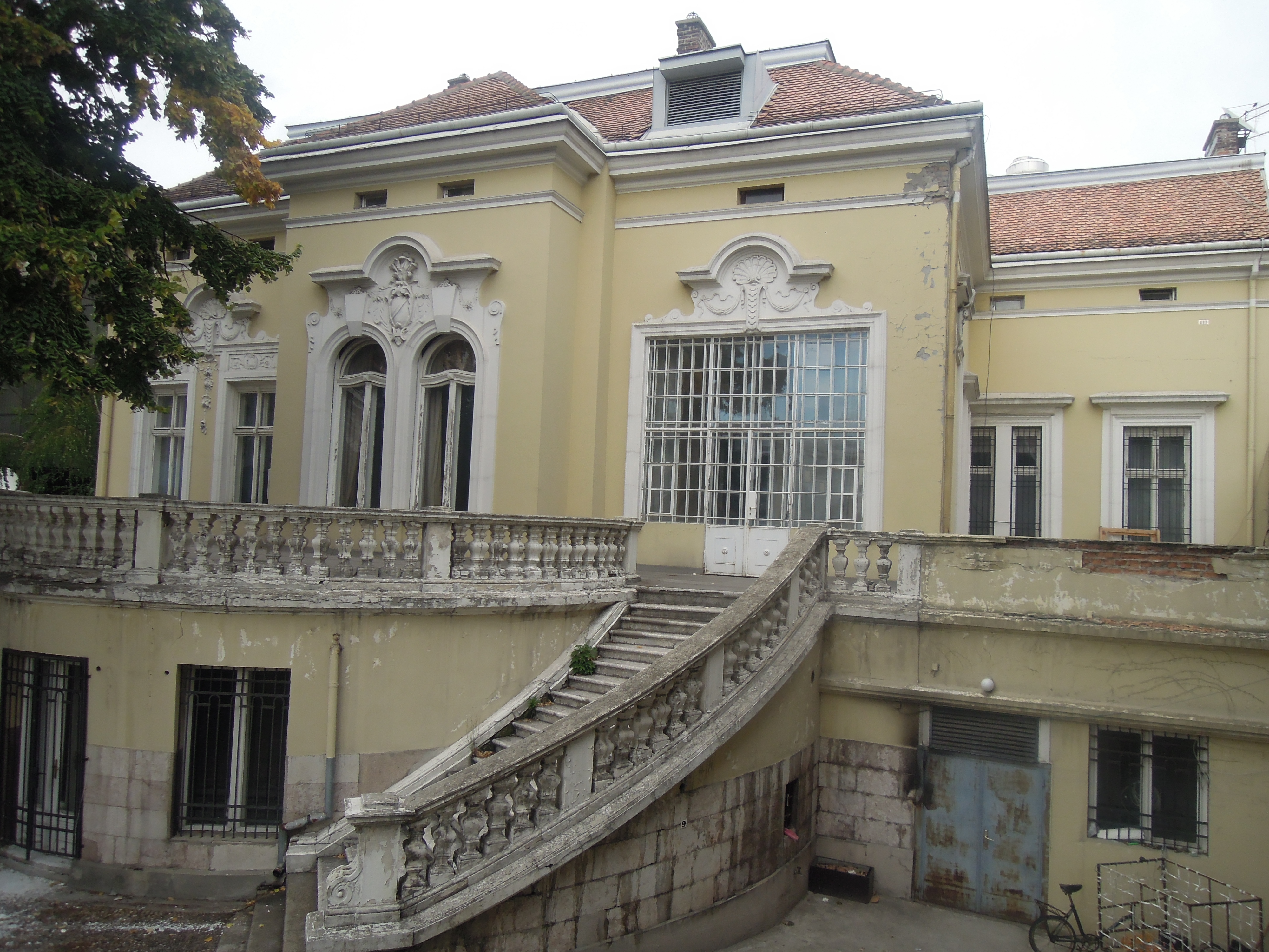 Krsmanovićeva kuća u Beogradu.